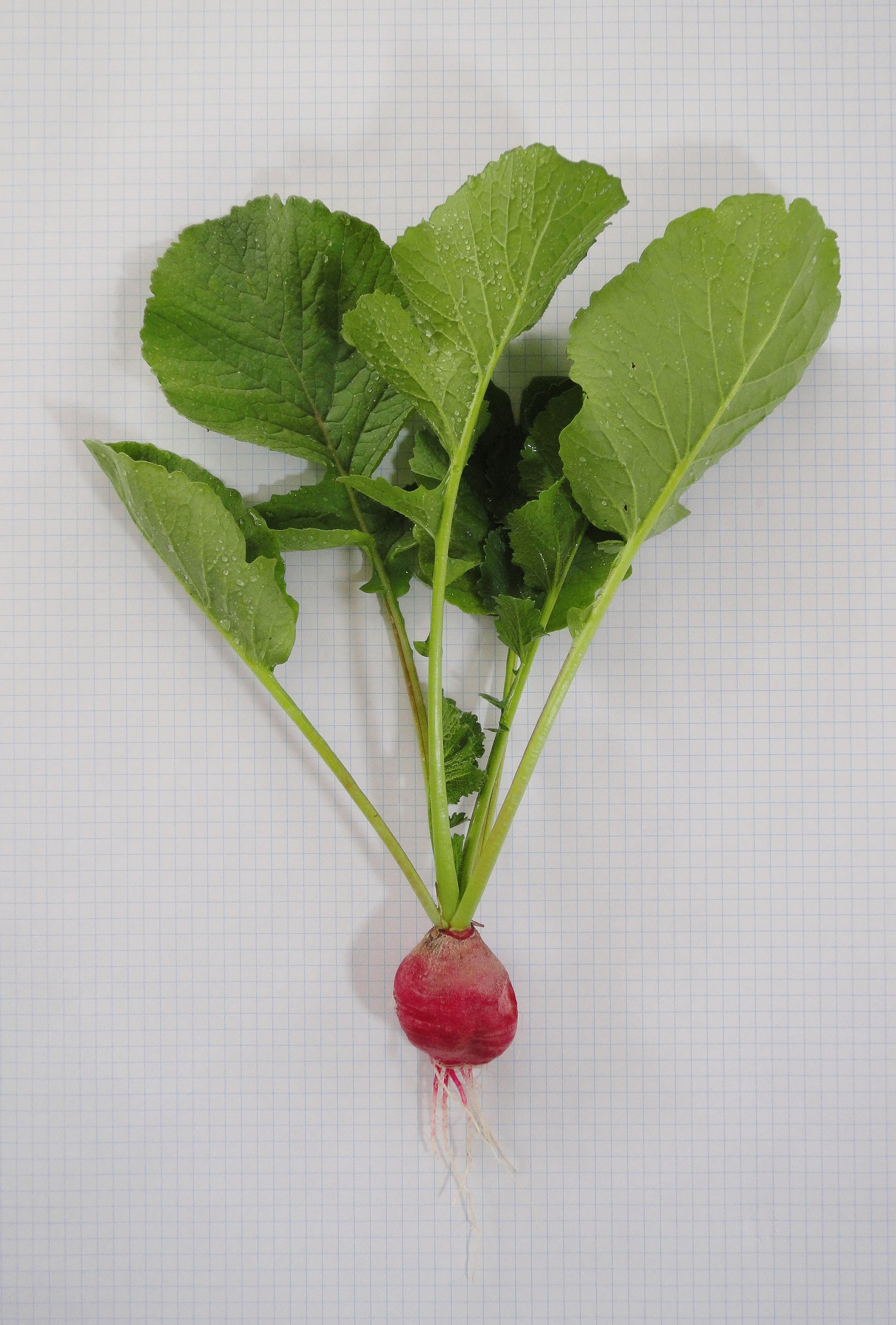 Imagen de un rábano de 2 meses de edad sobre fondo cuadrículado.